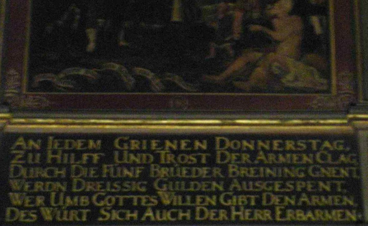 Armentafel in der Vorhalle der Tübinger Stiftskirche zur Erinnerung an die 5 Brüder der Familie des Tübinger Vogts Konrad Breuning: „An jedem grünen Donnerstag zu Hülf und Trost der Armen Klag, durch die fünff Brüder, Breuning gnennt, werden dreissig Gulden ausgespendt, wer umb Gottes willen gibt den Armen, des wird sich auch der Herr erbarmen.“ Siehe auch Armentafel in der Vorhalle der Tübinger Stiftskirche